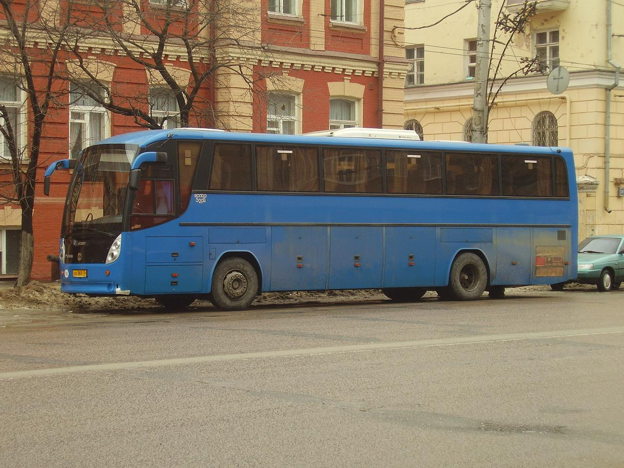 Туристический автобус ГолАЗ-52911 на шасси Scania